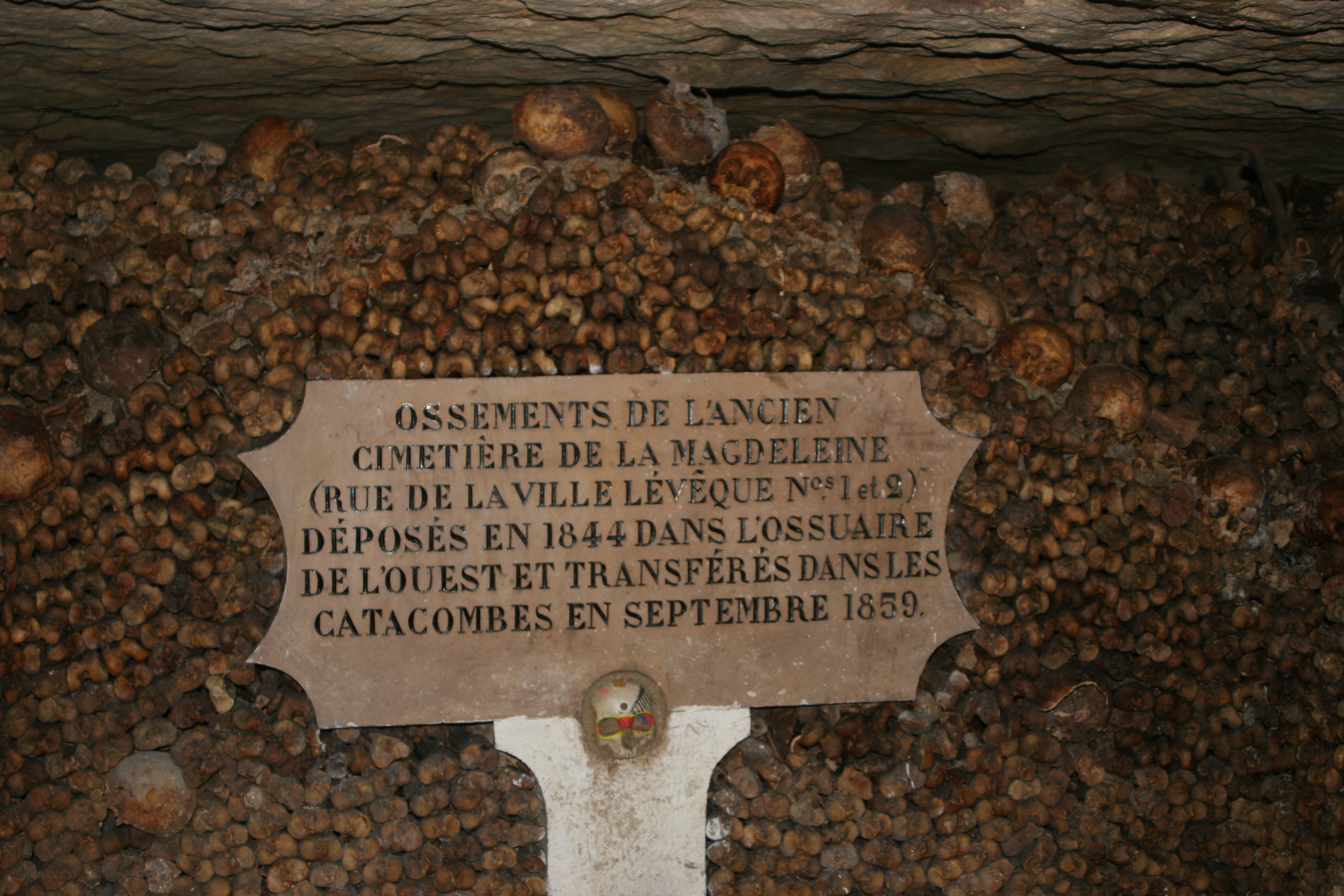 Catacombes Parijs. Foto gemaakt op 7-8-2005